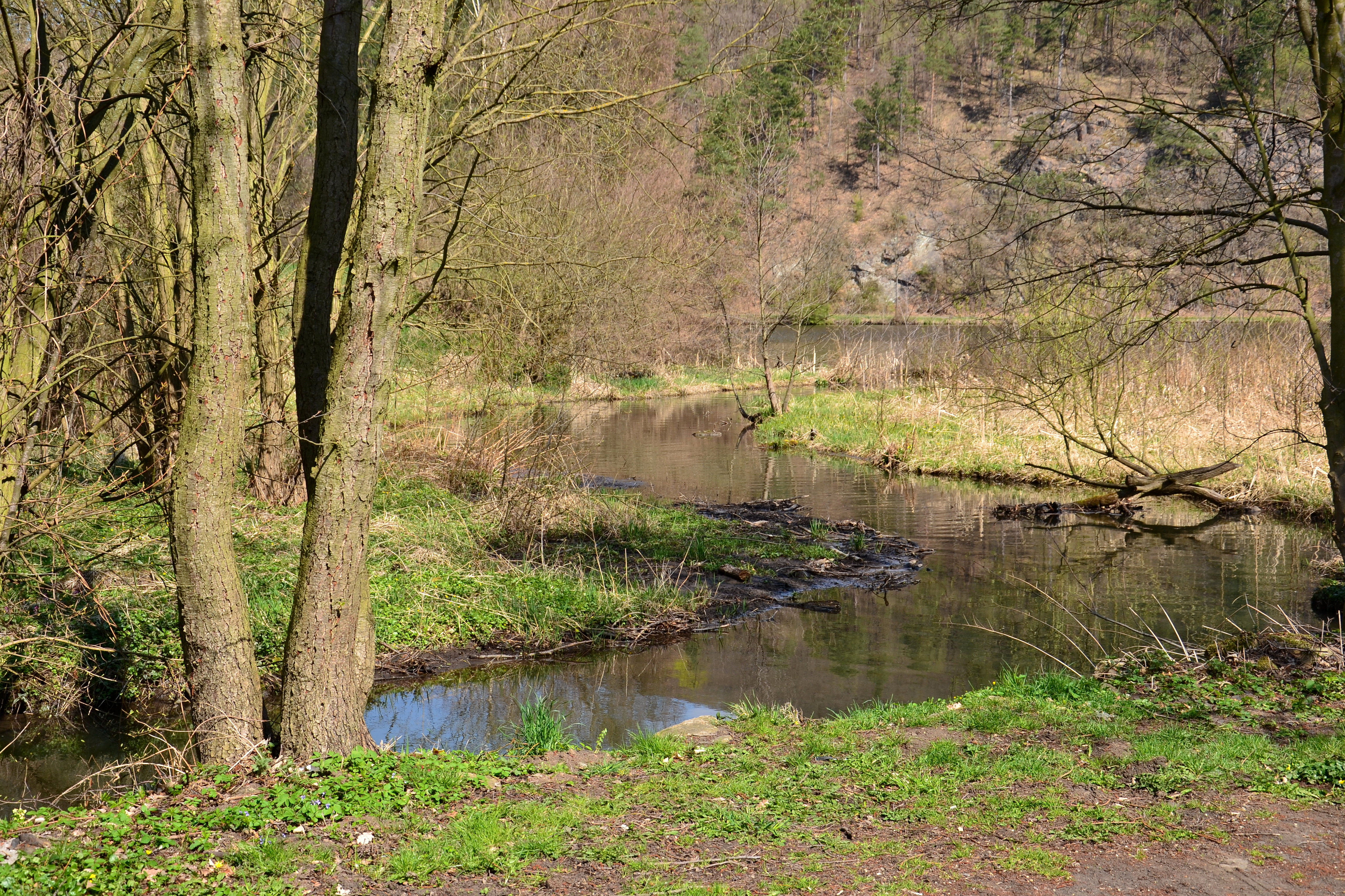 Soutok Donínského potoka s Ohří